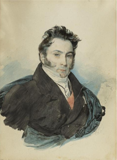 Alexander Ivanovich Ribeaupierre (1781-1865)